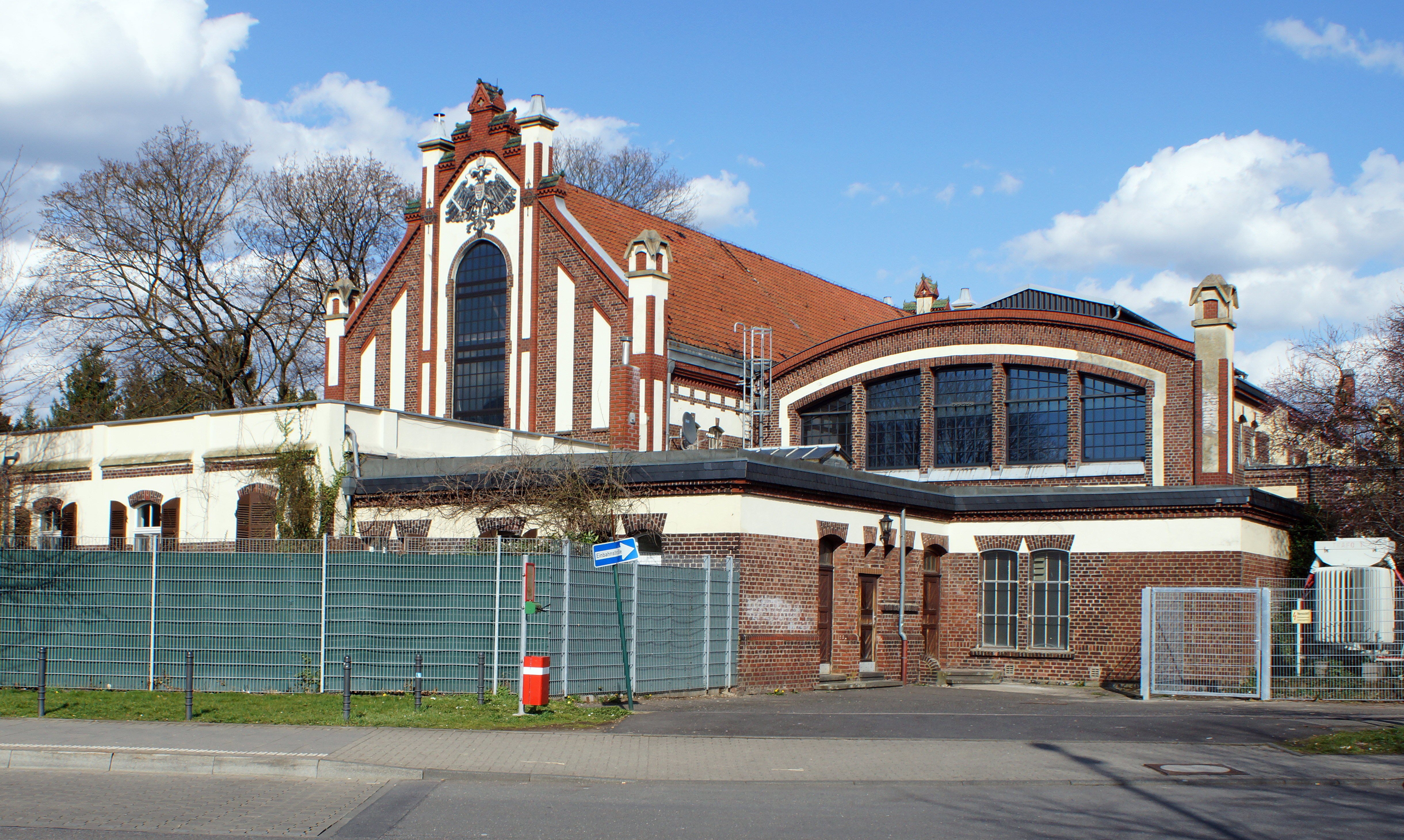 Das Umspannwerk Köln-Ostheim im April 2013. This is the photograph of an architectural monument. It is part of the list of cultural monuments of Köln, no. 7929